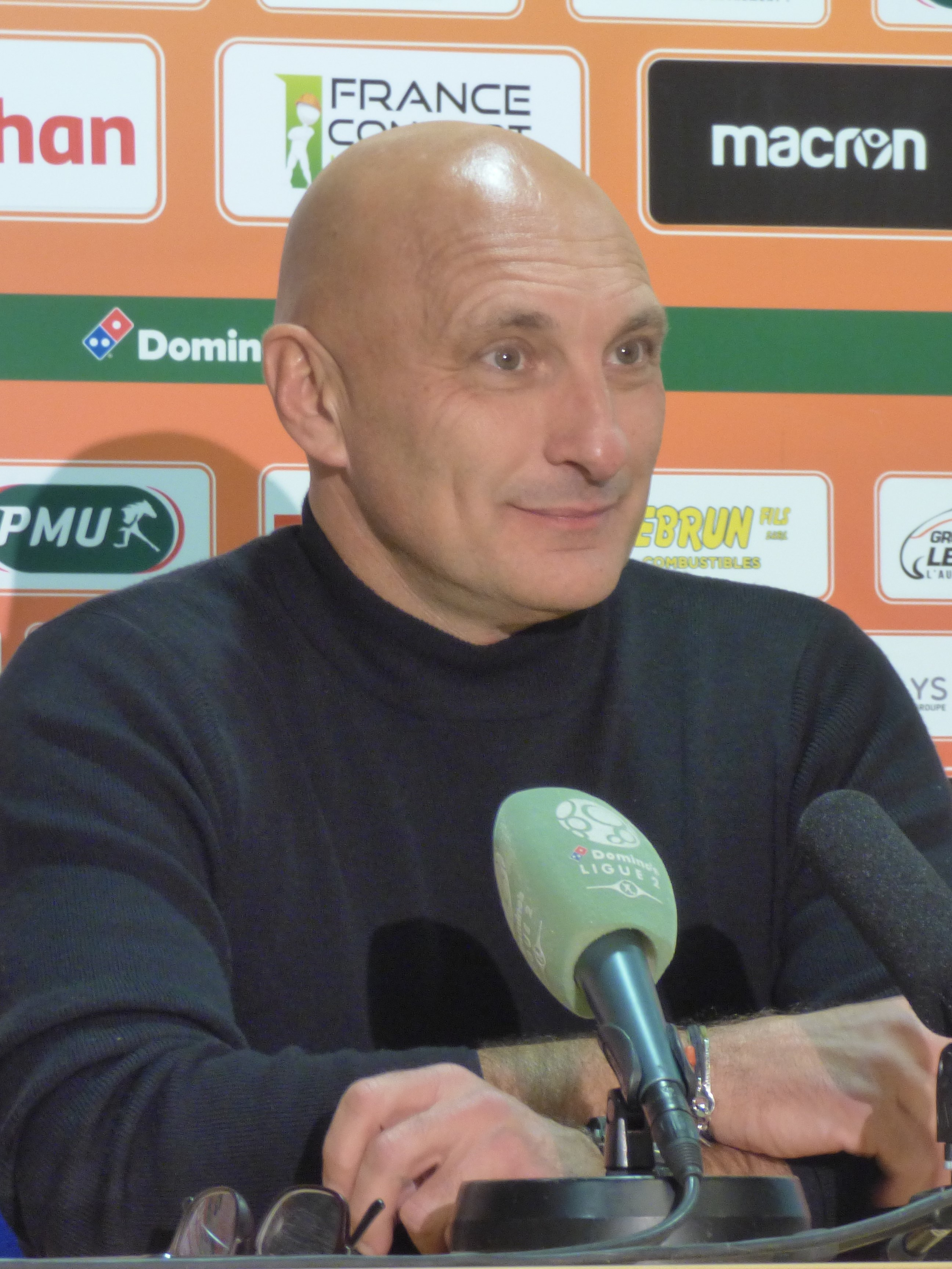 Olivier Pantaloni après le match RC Lens - AC Ajaccio, comptant pour la dix-neuvième journée du championnat de France de Ligue 2 2018-2019, le 22 décembre 2018, au Stade Bollaert-Delelis de Lens.